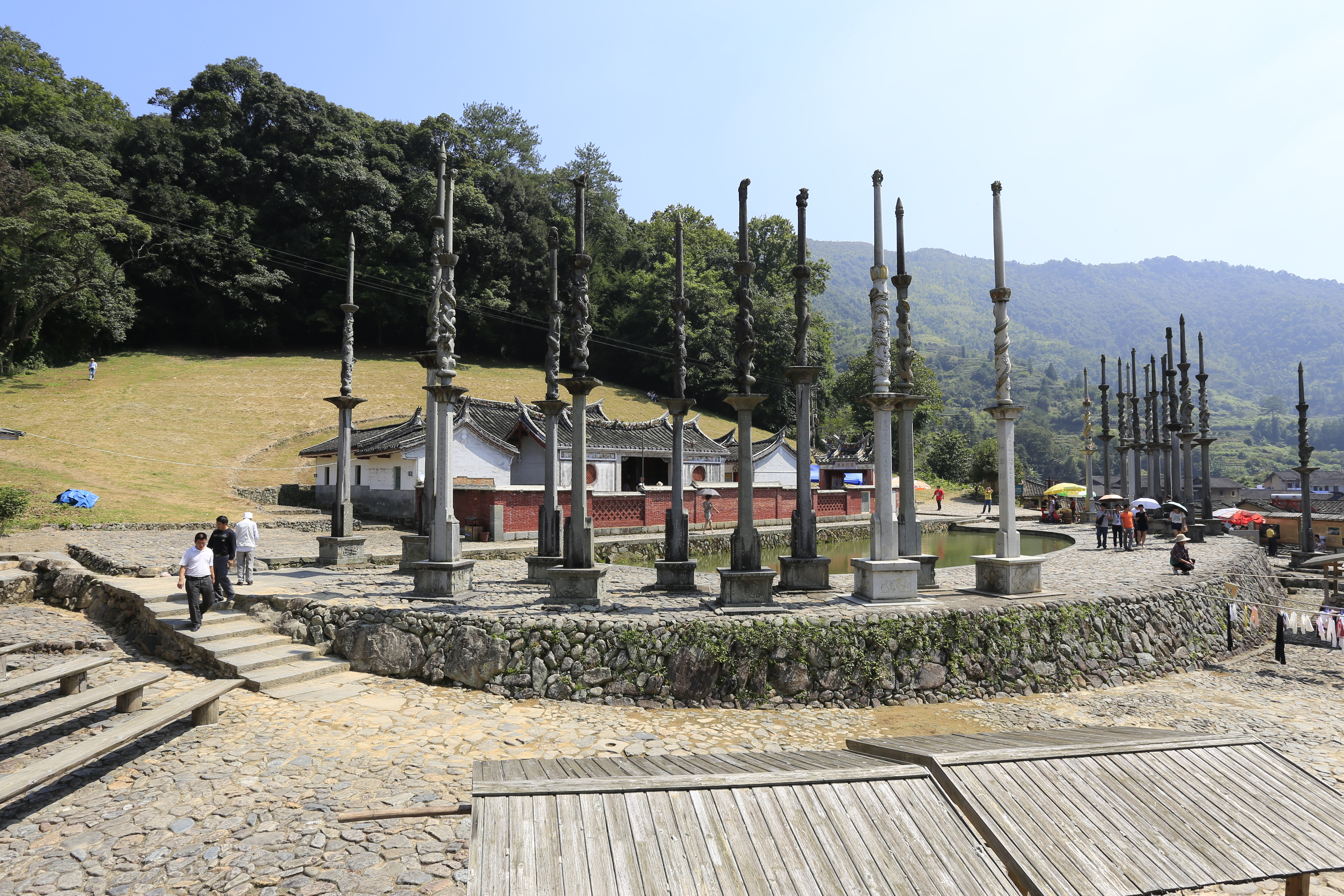 福建省南靖县书洋镇塔下村——德远堂（张氏家庙）